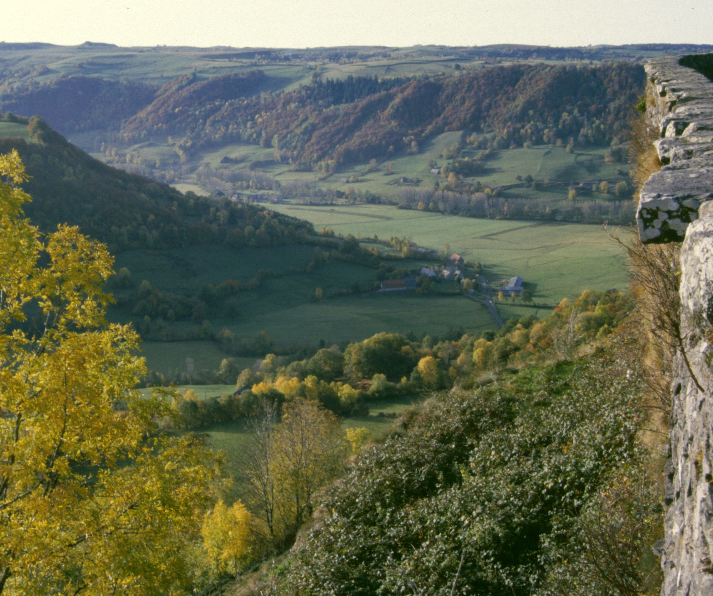 Cantal, Blick von Salers